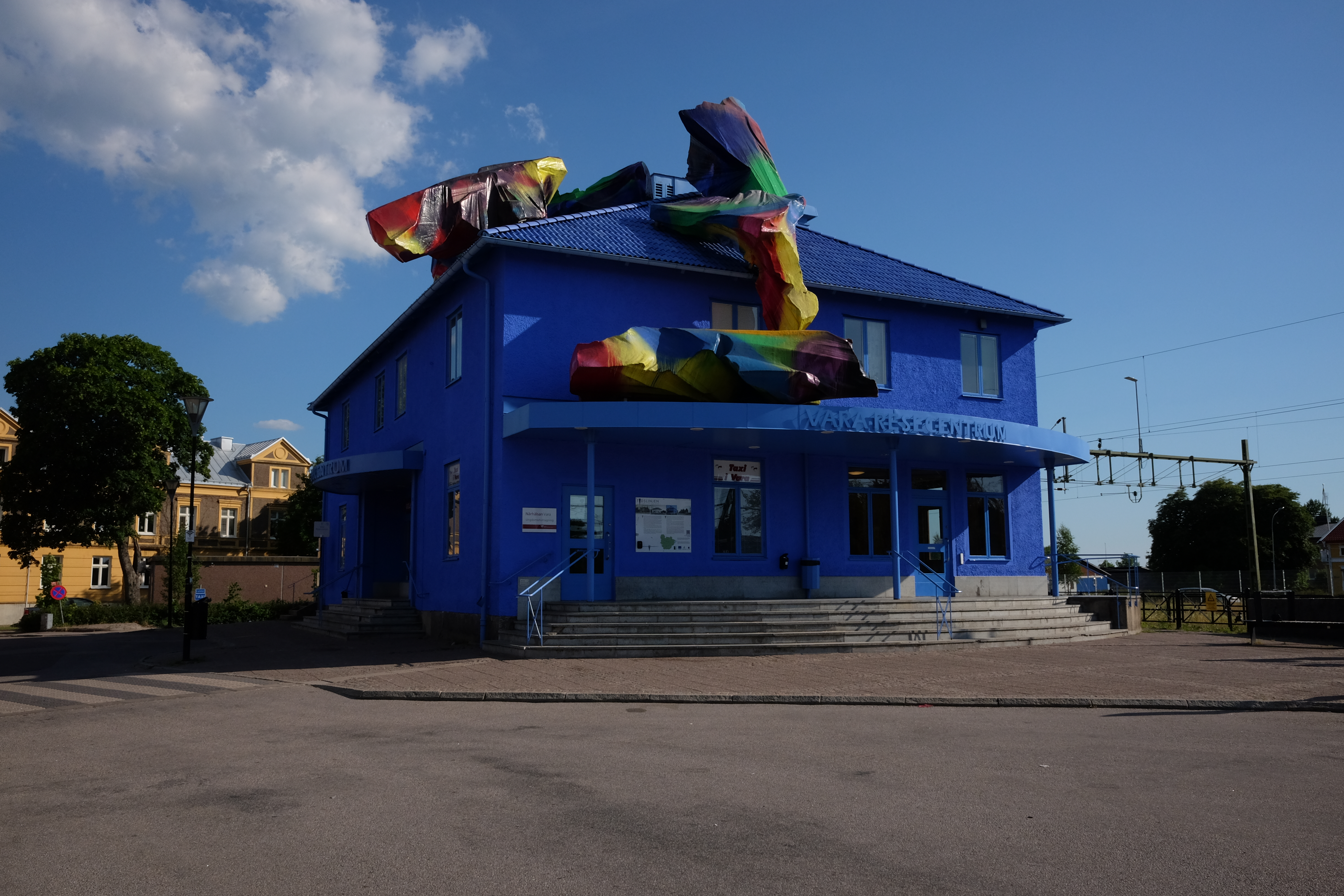 Vara resecentrum.